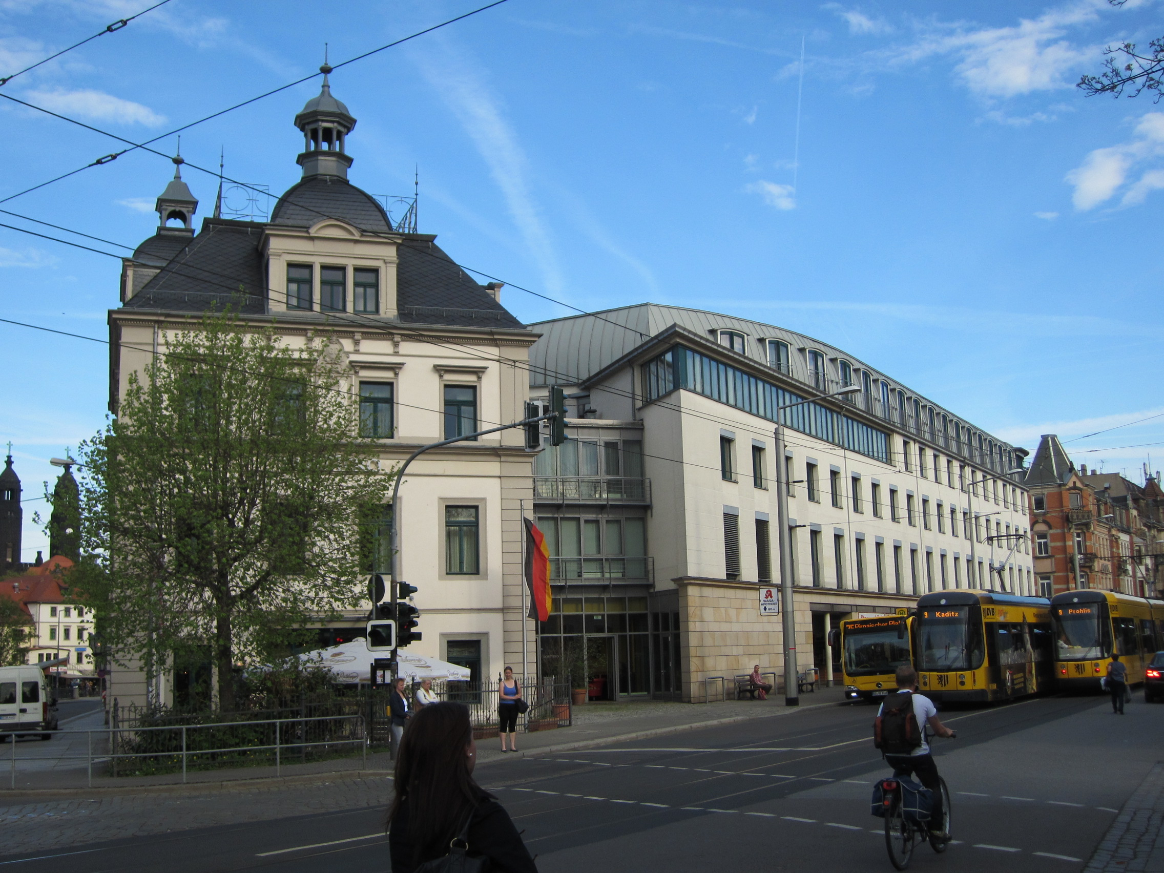 Das Hotel Königshof am Wasaplatz in Dresden-Strehlen von Westen